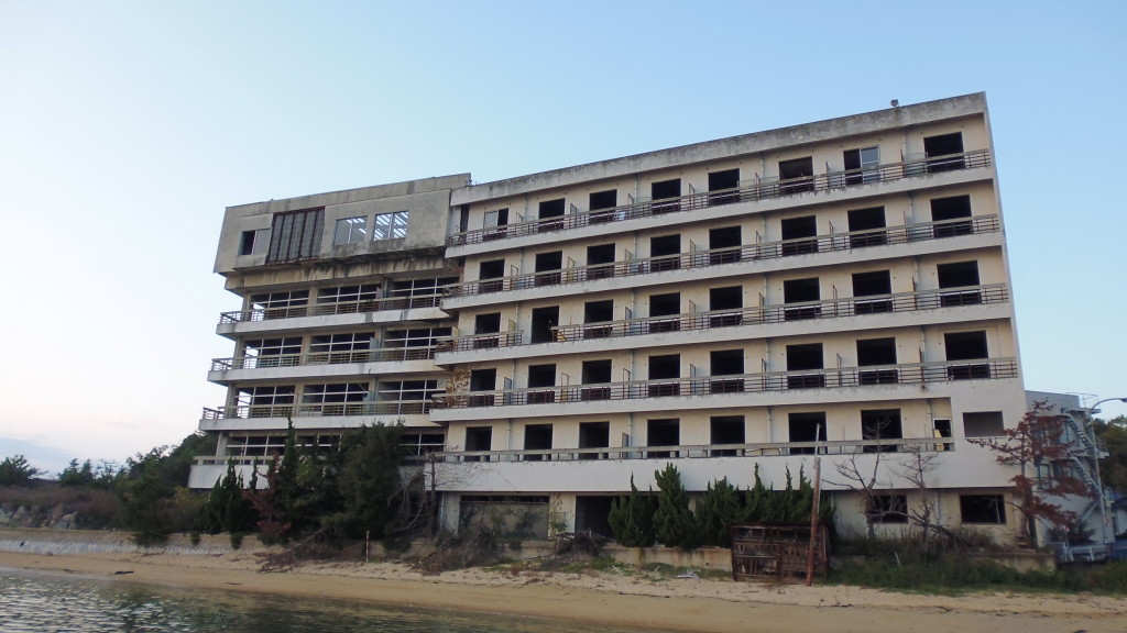 廃墟ホテル「濤洋荘」の外観